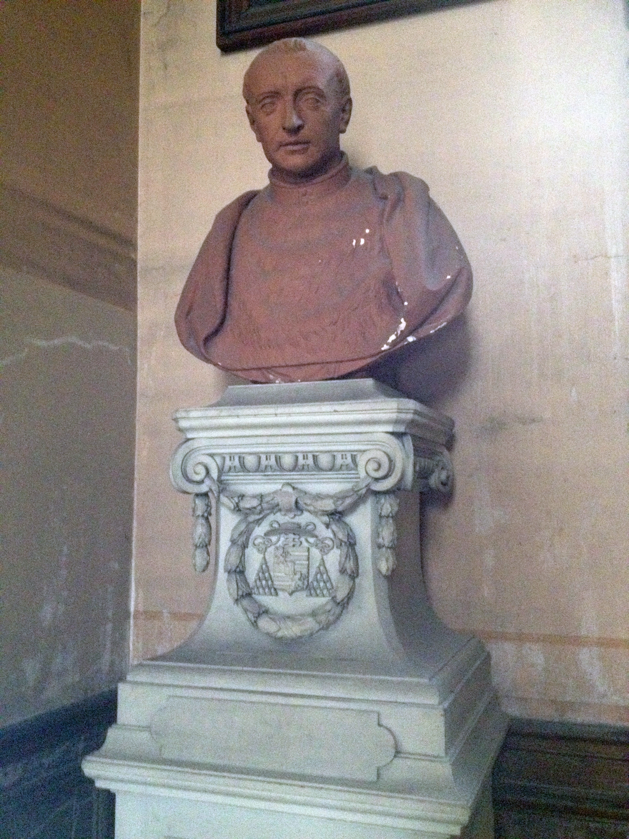 Buste de Guillaume d'Estouteville.